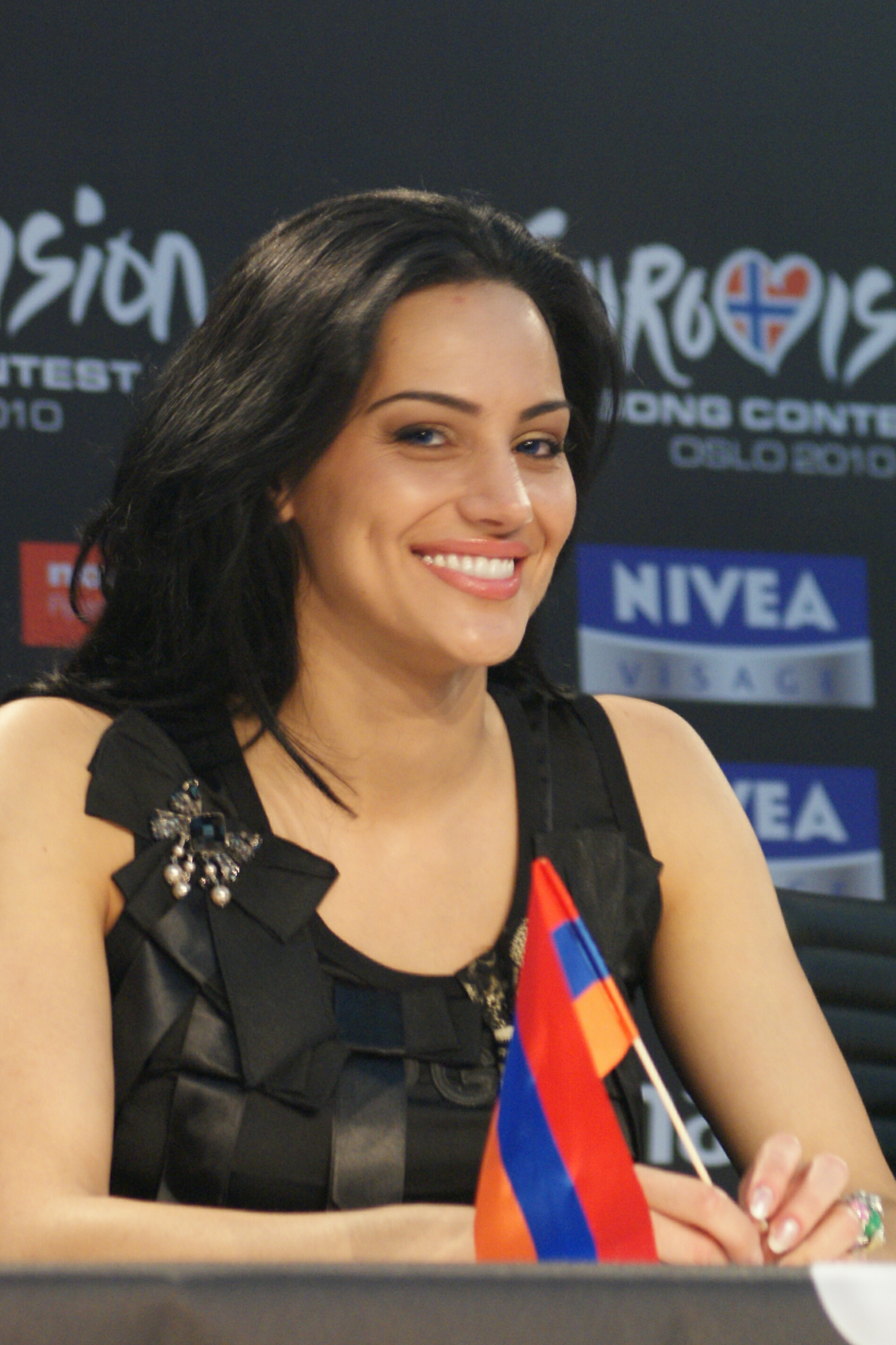 Eva Rivas